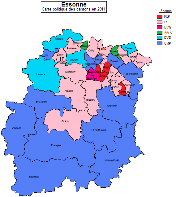 Carte politique des cantons de l'Essonne après les élections de mars 2011